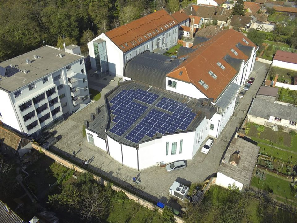 Fakultet nas